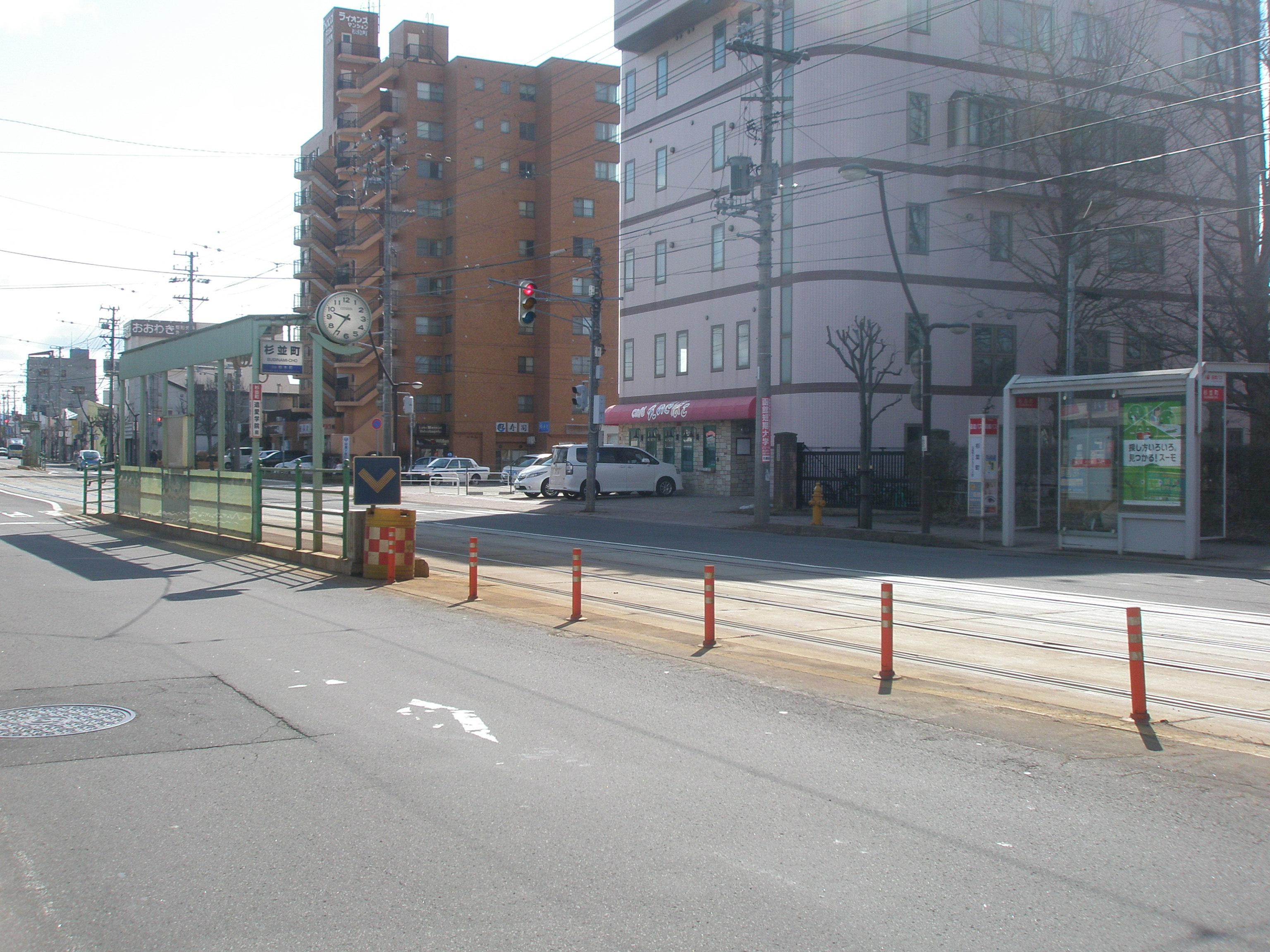 函館市企業函館市企業局交通部・杉並町停留場・復線乗り場（湯の川方面）の、導流用ラバーポールを含めた全景